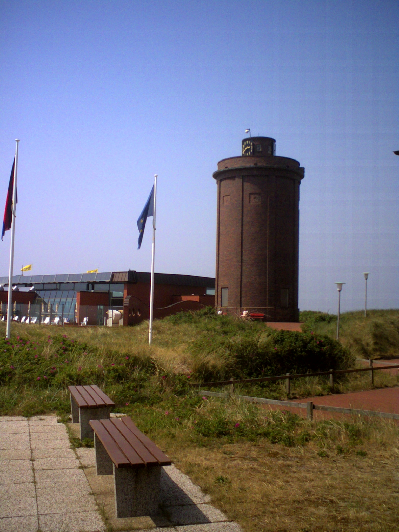 Alter Wasserturm auf der ostfriesischen Nordseeinsel Juist, daneben das Kurmittelhaus mit Hallenbad